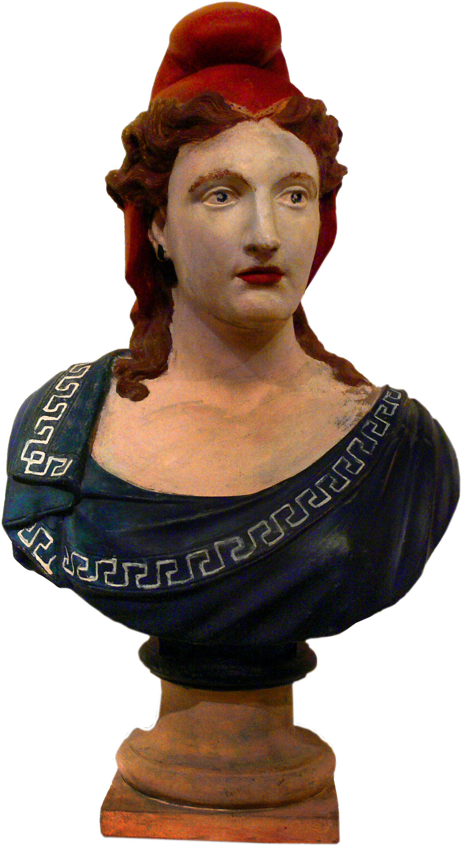 Buste ancien de Marianne (anonyme), une des multiples représentatione symboliques de la République française, exposé dans les couloirs du Sénat à Paris. Photo de F. Lamiot (own work), faite le 15 novembre 2006.